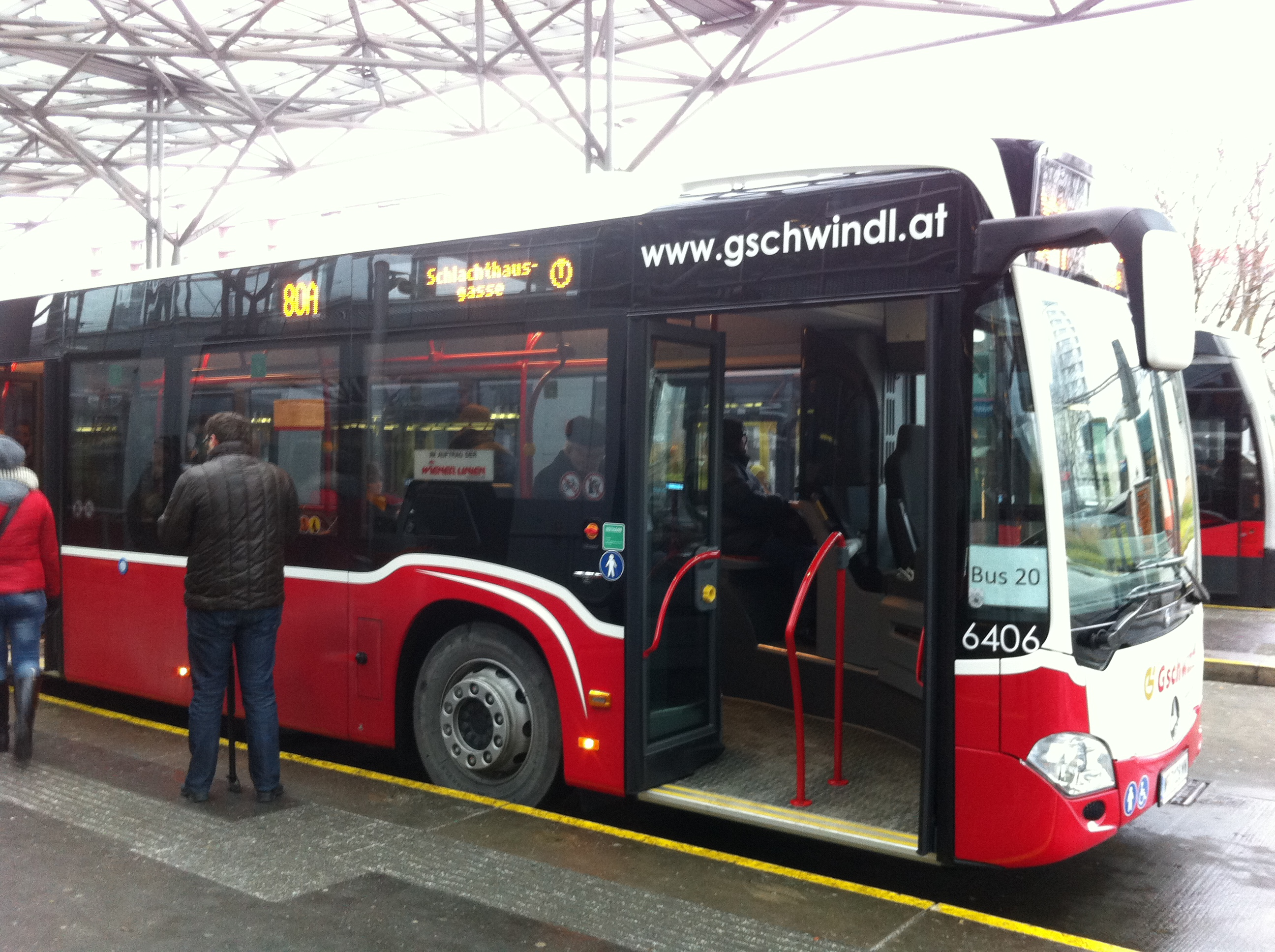 Ein Mercedes-Benz Citaro II Euro 6-Bus in der Haltestelle Praterstern im Einsatz auf der Linie 80A